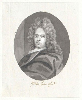 Porträt des Gottfried Heinrich Elend von Elendsheim.